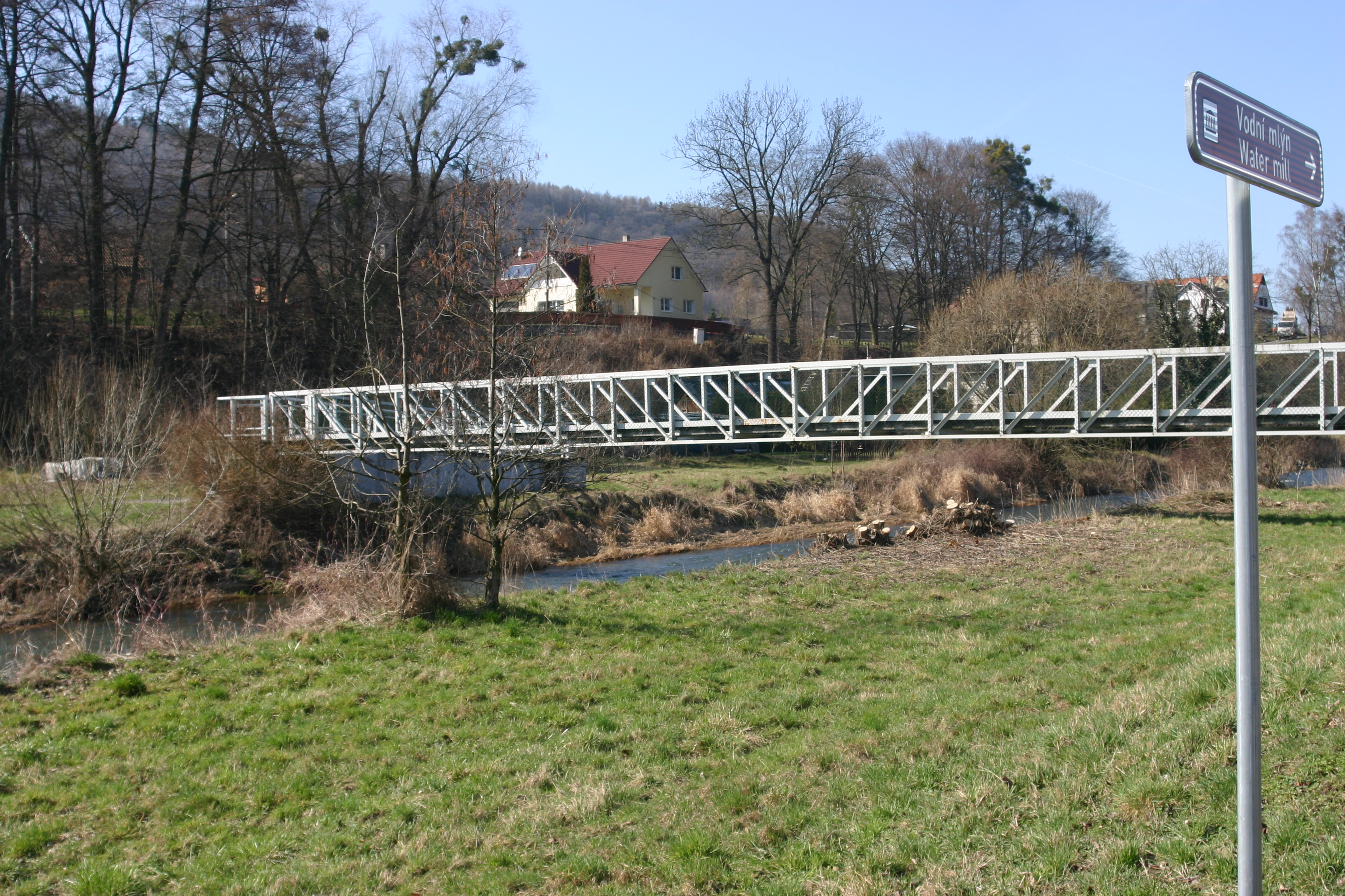 Most přes řeku Odru v obci Loučky